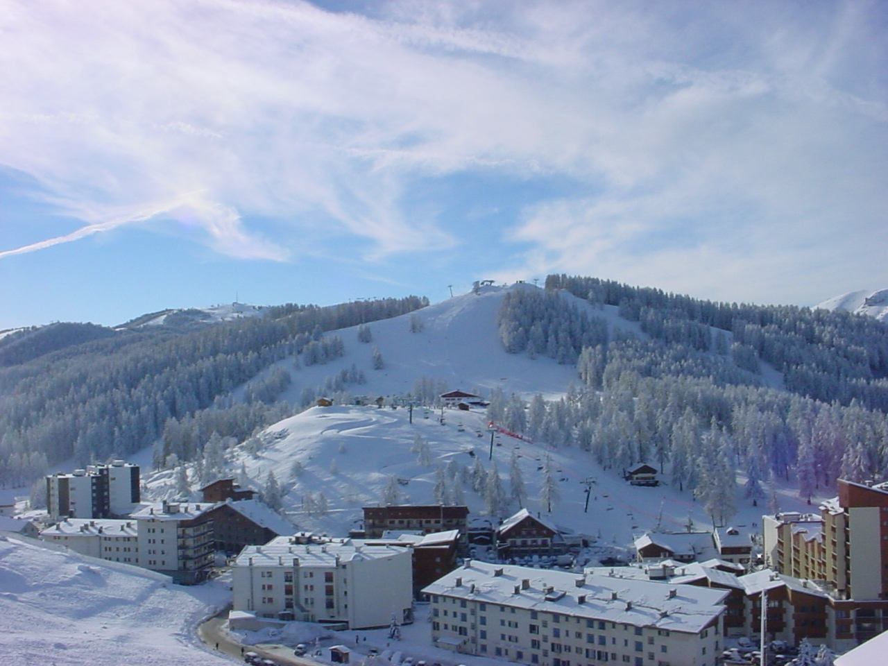 En hiver, le centre de la station de Valberg (06 - FRANCE) puis le télésiège du Garibeuil et, au fond au milieu, la Croix-du-Sapet au fond et, au fond, à gauche, La-Dreccia.